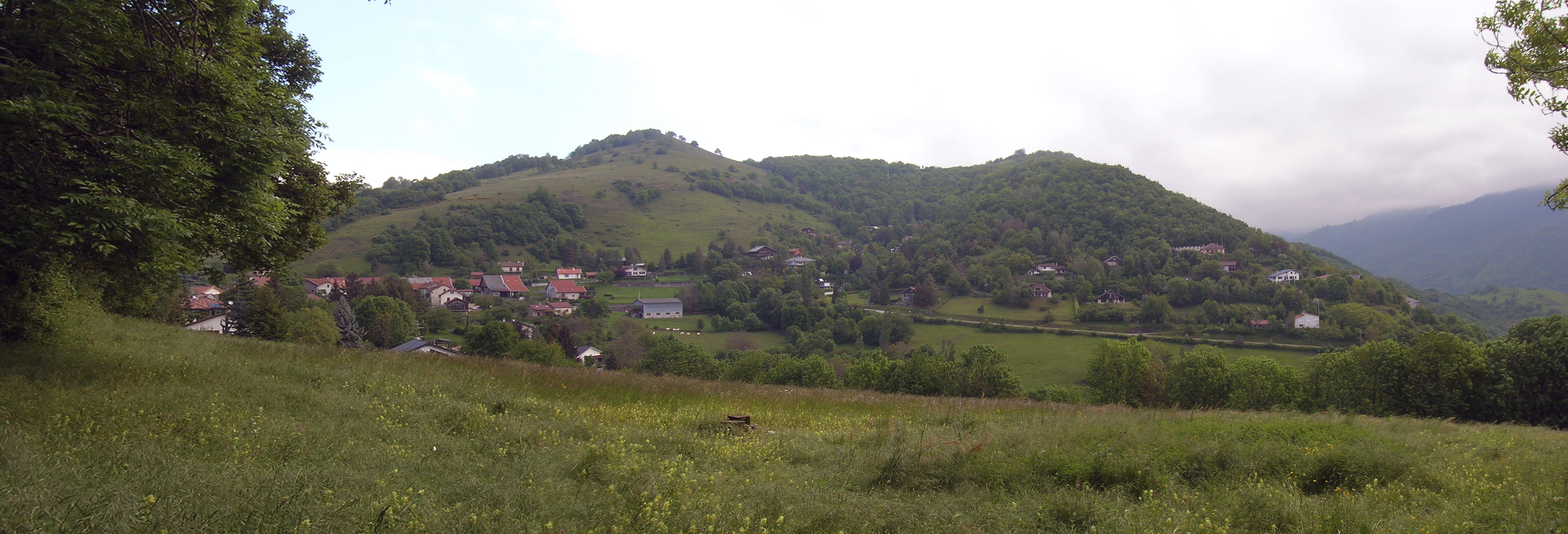 Montchaboud, Isère, AuRA, France.